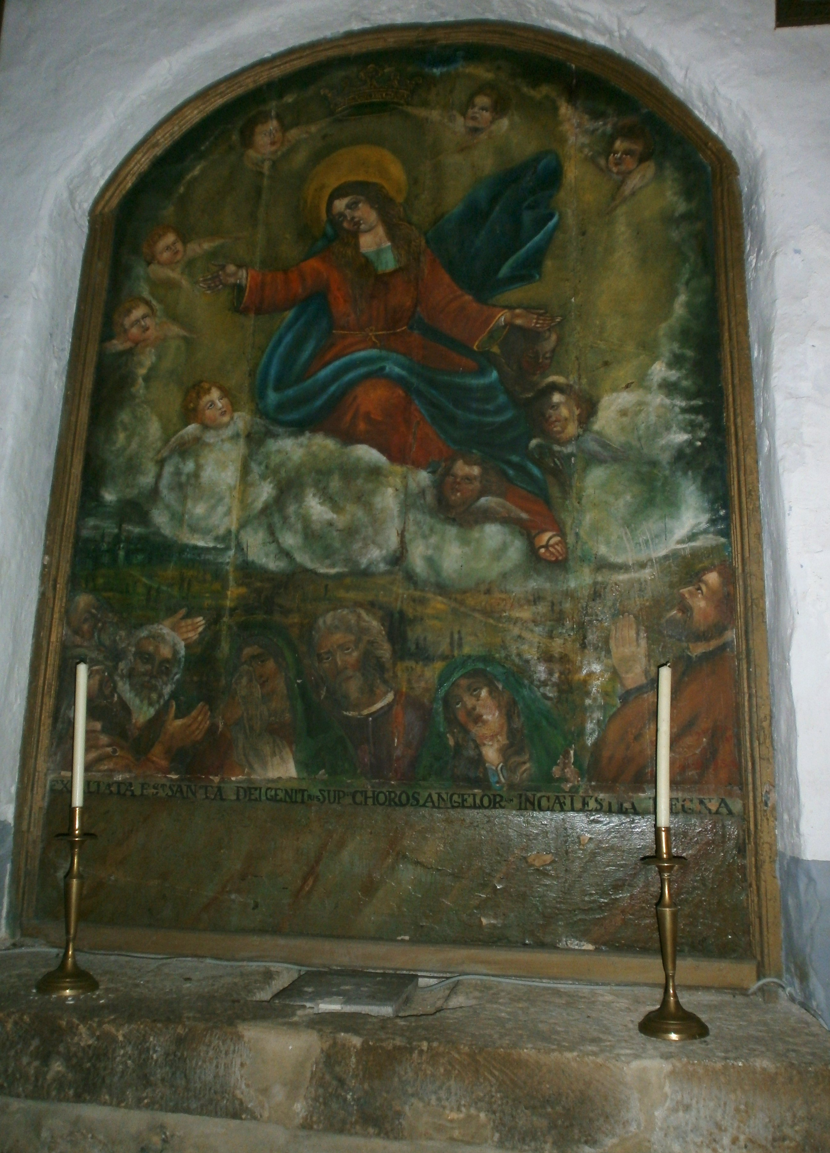 Mural de la Ascensión de la Virgen en el leteral izquiedo de la nave central.